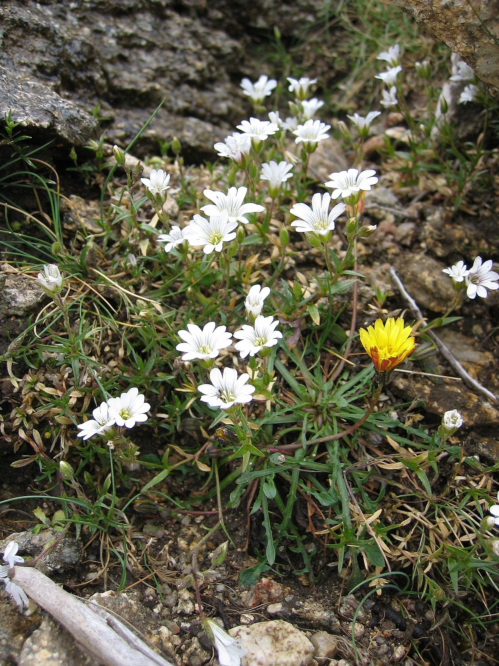 Cerastium soleirolii, near Monte Cinto ~1600, Corse